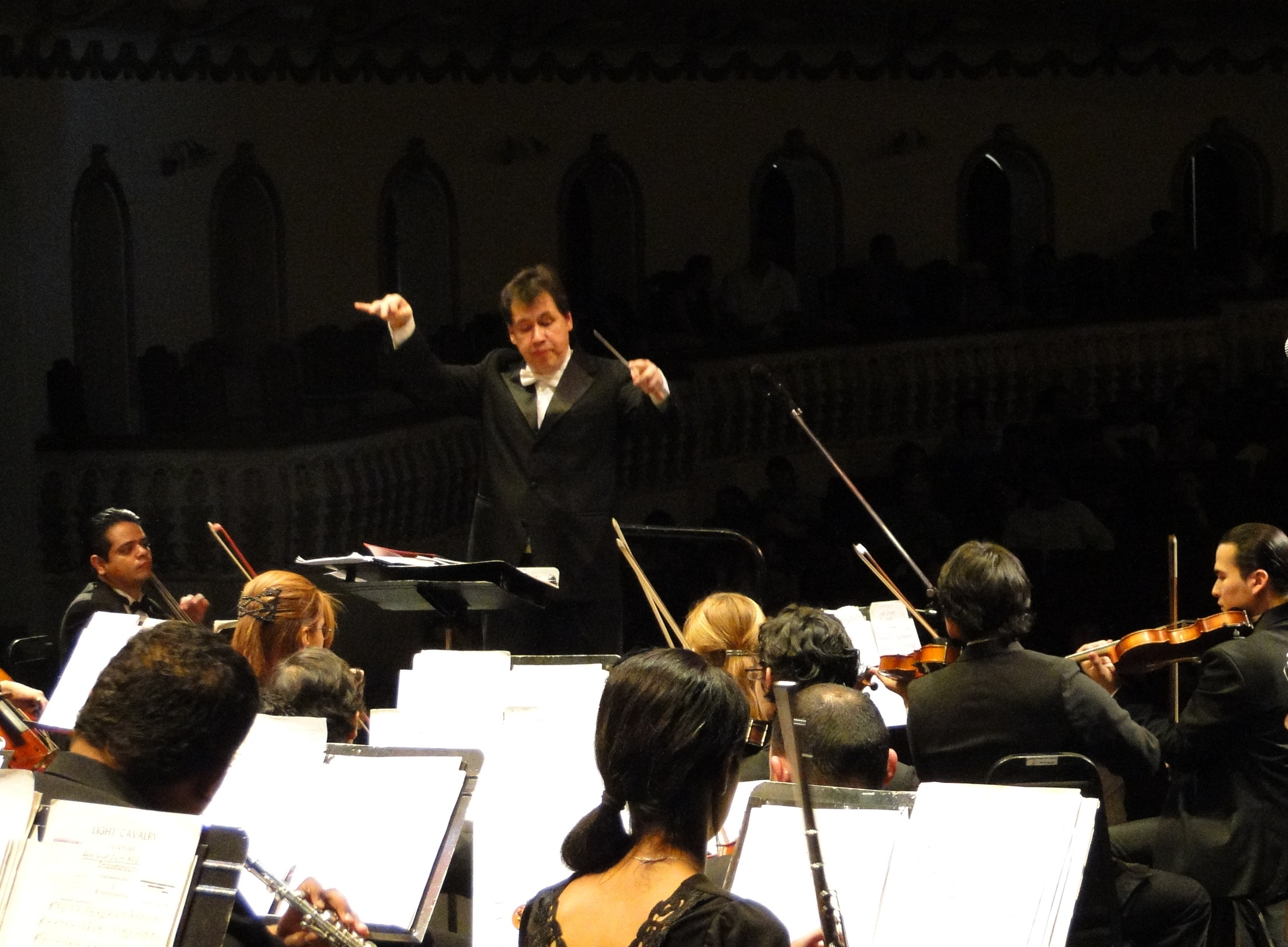 Jorge Mejía dirigiendo la Orquesta Filarmónica de Honduras.